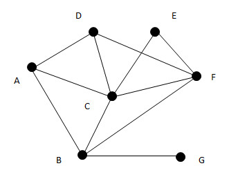 Exemple de selection de MPR